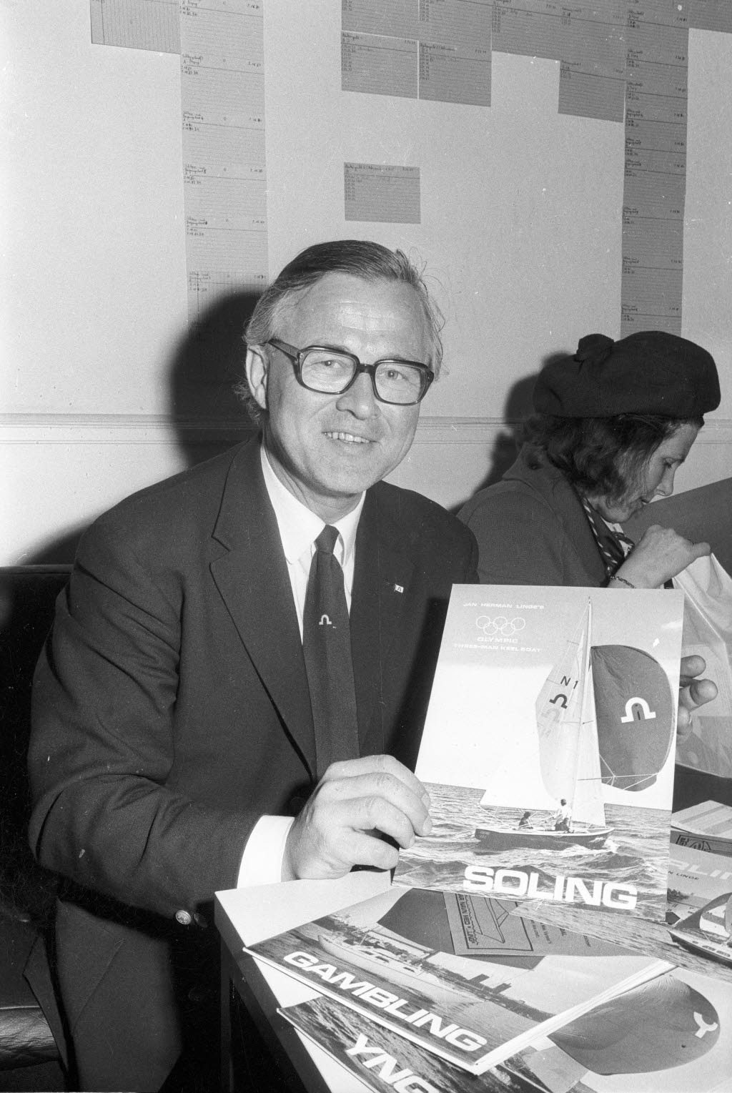 Bootskonstrukteur aus Norwegen. Seine erfolgreichste Konstruktion ist der Soling, der auch zu den olympischen Klassen gehört.